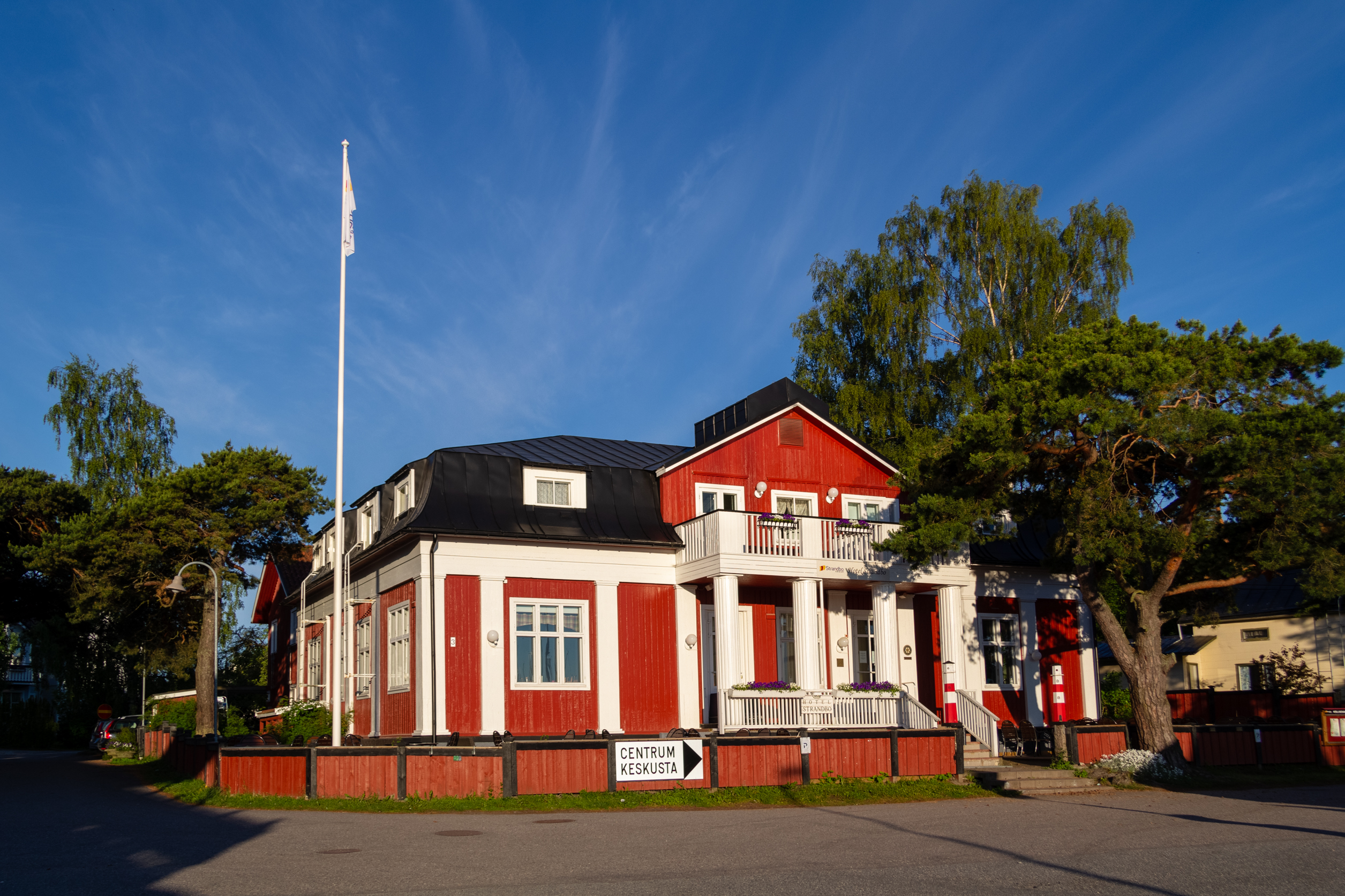 Bild på ett av Nagus hotell. Hotell Strandbo befinner sig i Norra Hamnen, Nagu Gästhamn.